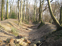 Die Vryburg in Essen-Horst